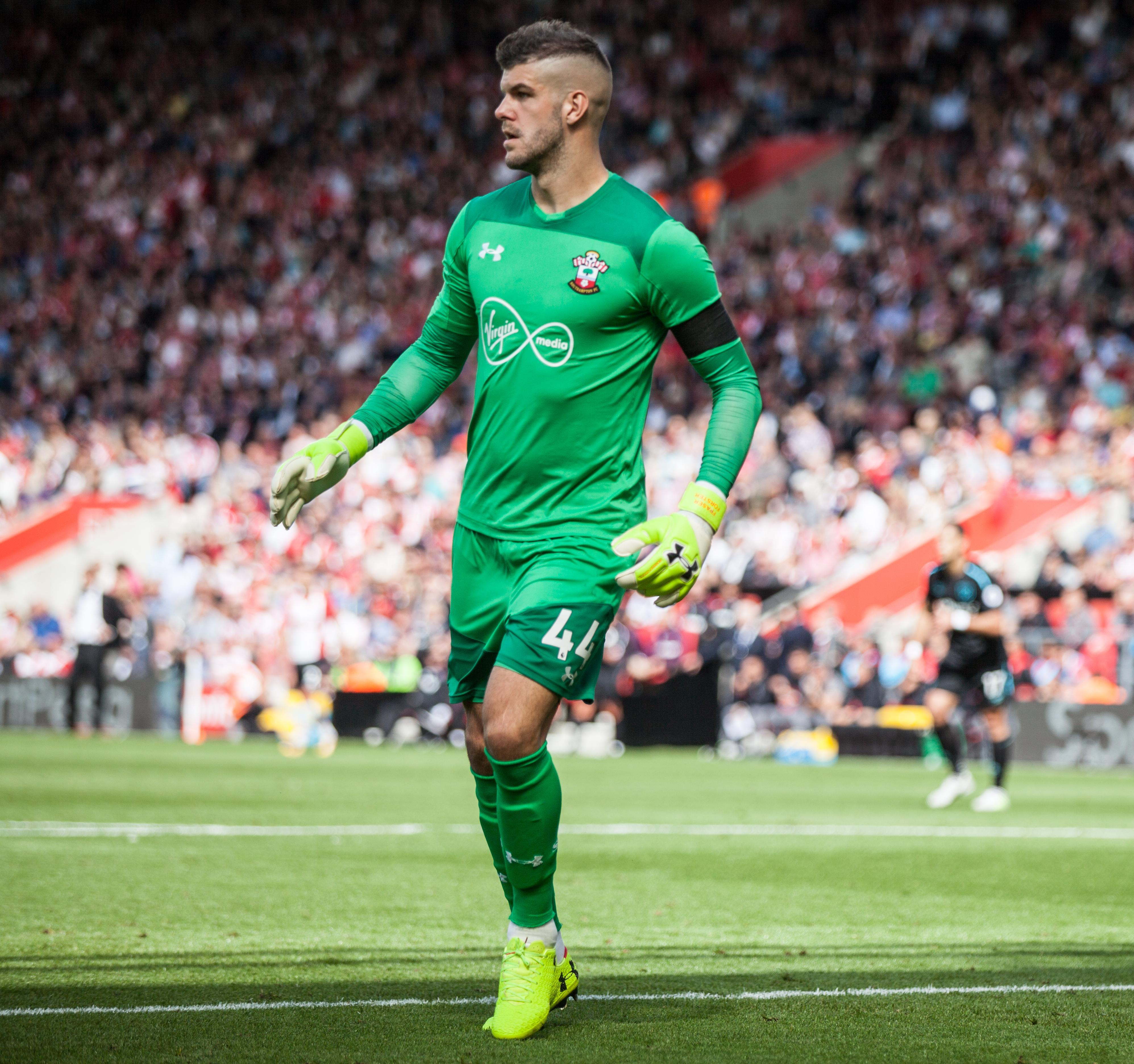 Southampton vs West Ham United